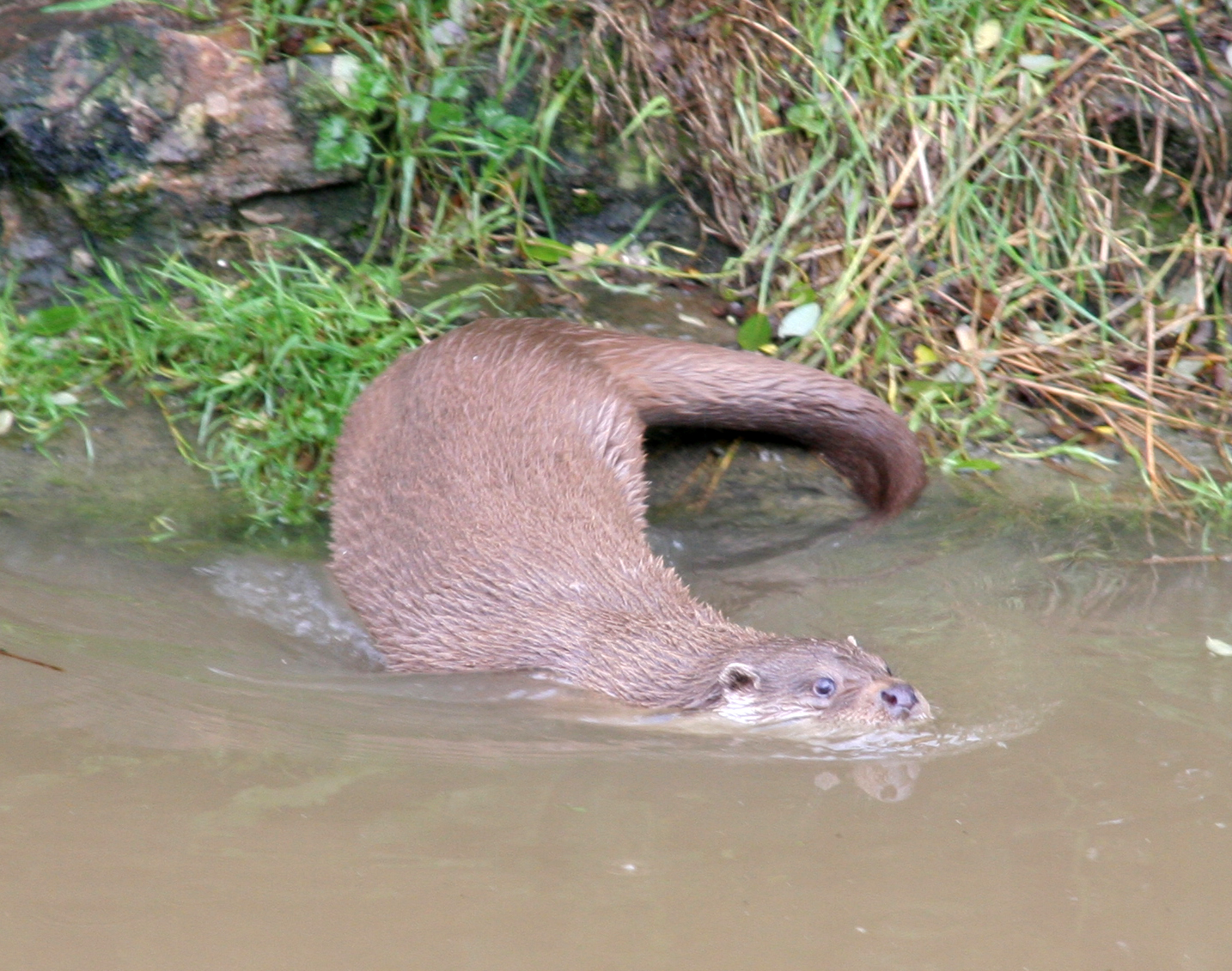 Otter 2